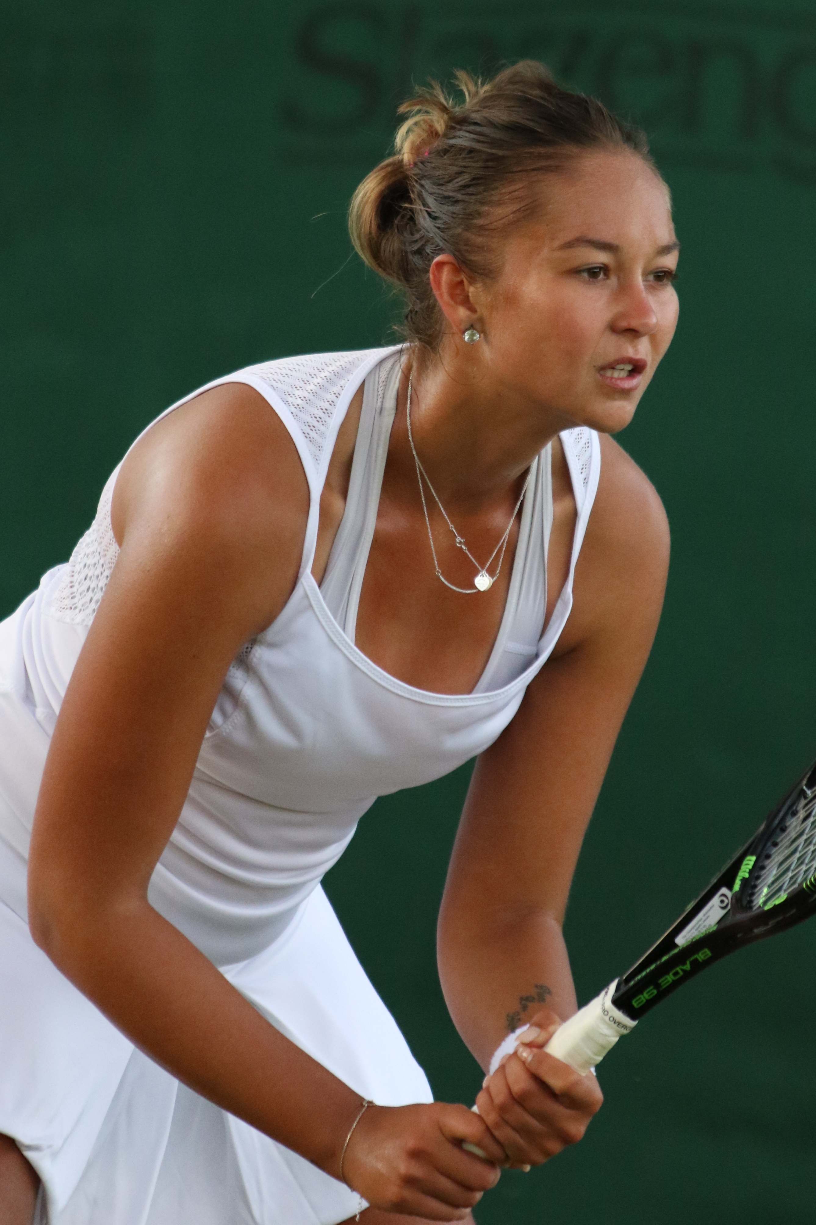 Kerkhove WMQ16 (4)